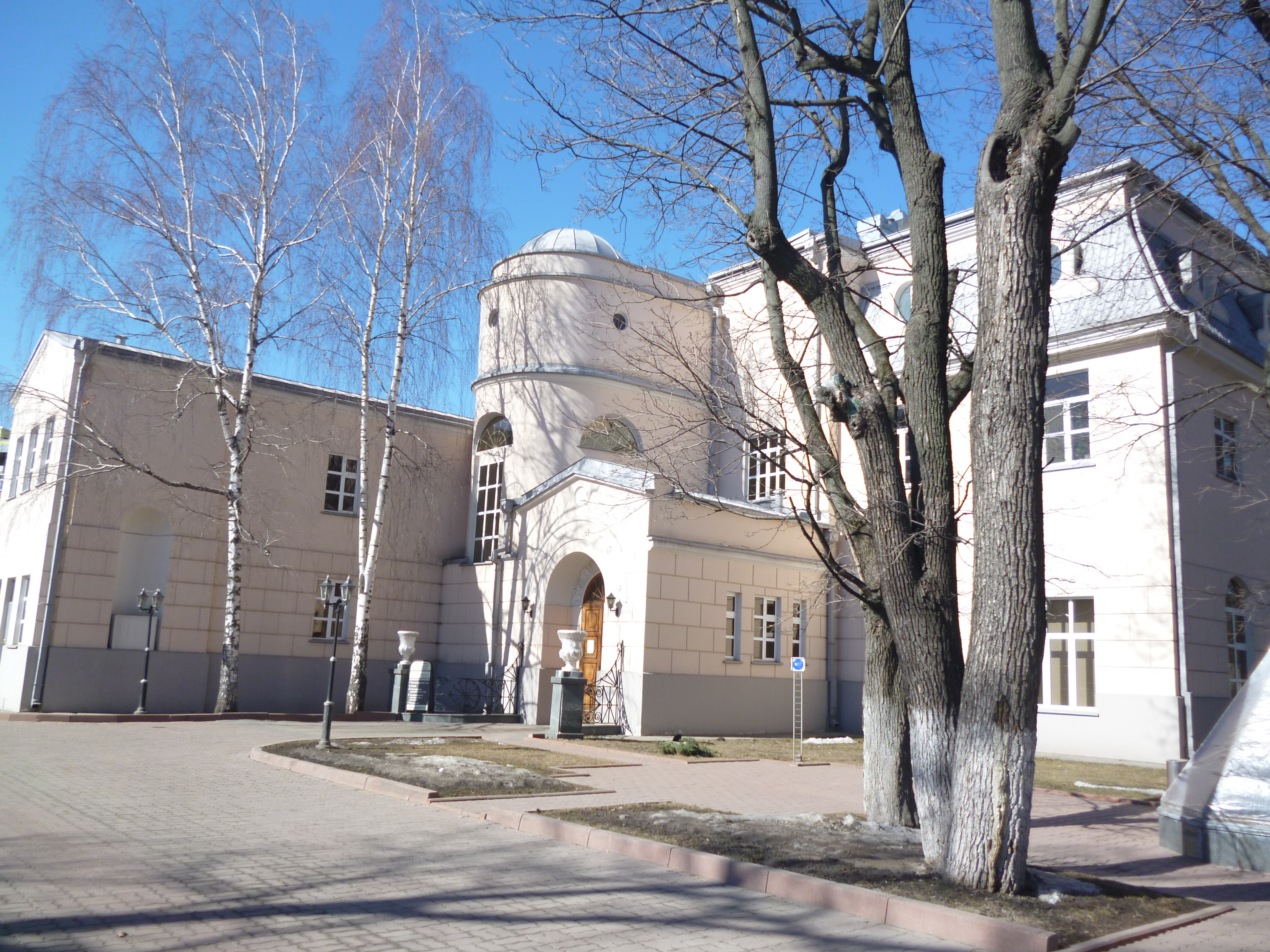 Вилла «Черный лебедь» (Н.П. Рябушинского) в Петровском парке: Нарышкинская аллея, дом 5, строение 1, Аэропорт, Северный округ, Москва